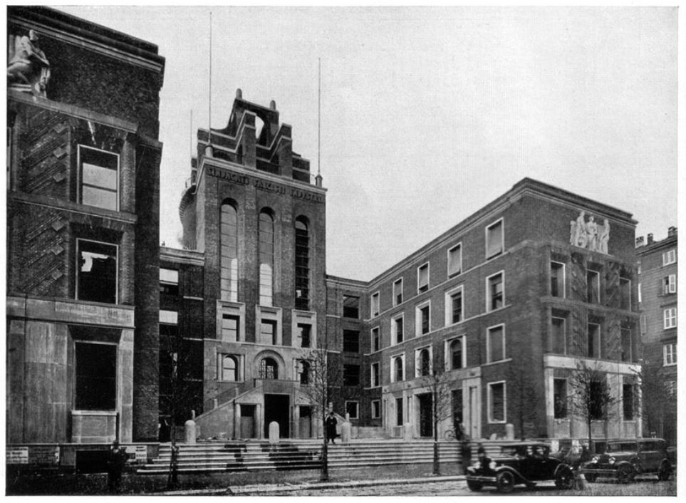 Il nuovo Palazzo dei Sindacati dell'Industria a Milano (1933). Da Architettura. Rivista del Sindacato nazionale fascista architetti